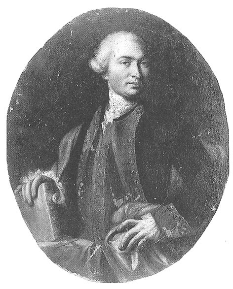 Il matematico e ingengere veronese Anton Maria Lorgna